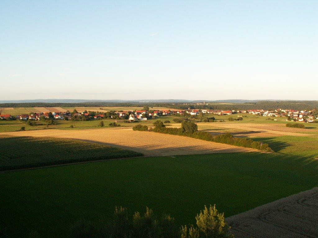 Würzberg Dorf und Flur